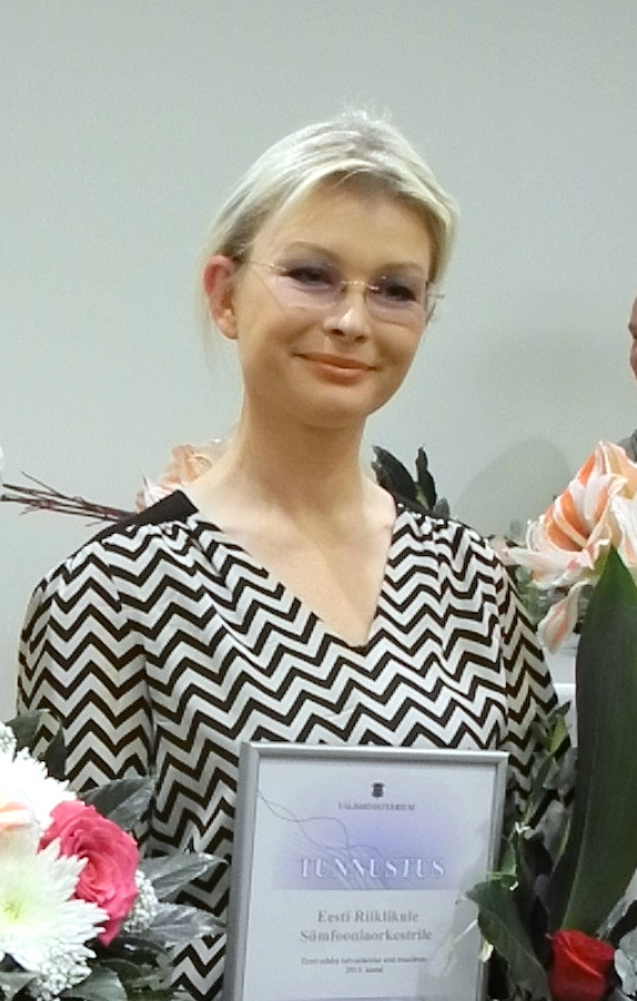 Kadri Tali, eesti mänedžer ja produtsent